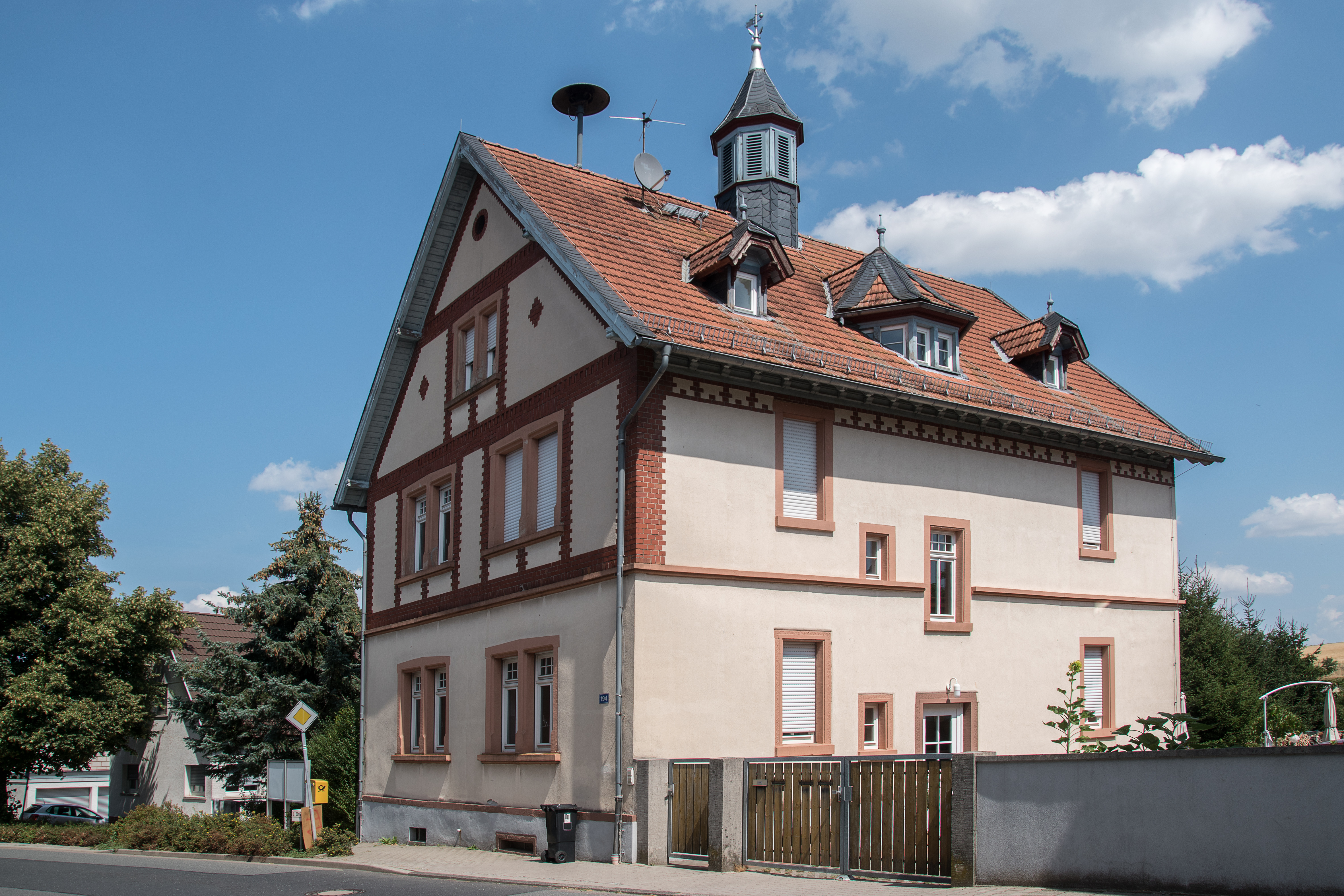 Denkmalgeschütztes Gebäude (ehem. Rathaus/Schule) in Ober-Ramstadt, Ortsteil Ober-Modau, Odenwaldstraße 194